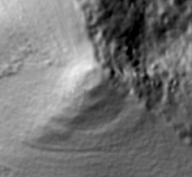 Geländehöhenmodell der Anlage am Kraxnerkogel in Warnblick, westlich von Deutschlandsberg, einer archäologischen Fundstelle eines Bauwerkes. Die im Bild erkennbaren Geländestufen sind auch in Wirklichkeit im Gelände noch teilweise erkennbar.